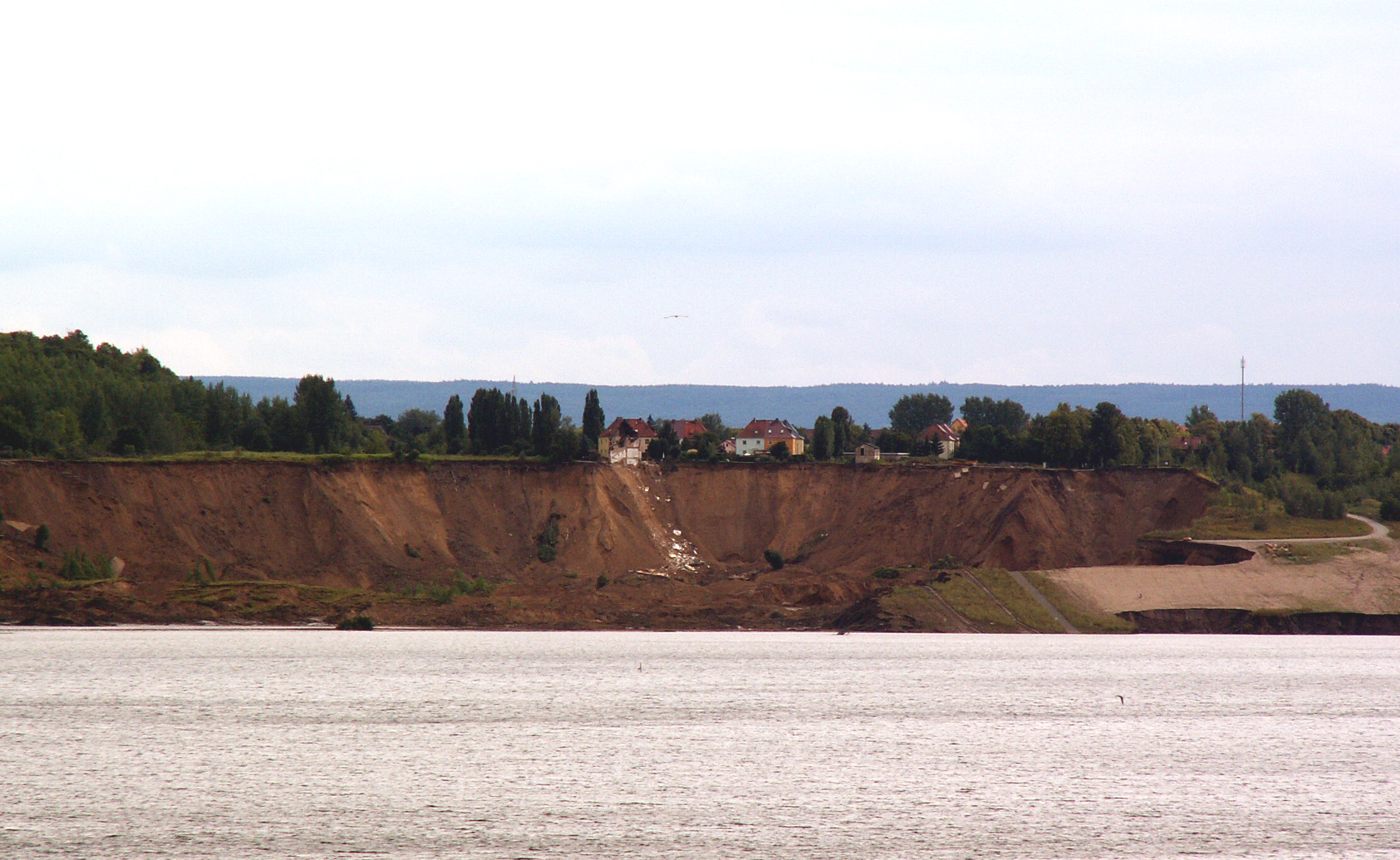 Unglücksstelle Concordiasee. Am frühen Morgen des 18. Juli 2009 kam es im Ortsbereich Nachterstedt zum Abbruch eines etwa 350 x 120 Meter breiten Landstreifens in den südlichen Ausläufer des entstehenden Concordiasees. An dieser Stelle klafft nun ein viele Meter tiefes Erdloch. Dabei wurden ein zweistöckiges Einfamilienhaus, ein Teil eines Mehrfamilienhauses sowie ein Straßenabschnitt und eine Aussichtsplattform mitgerissen.